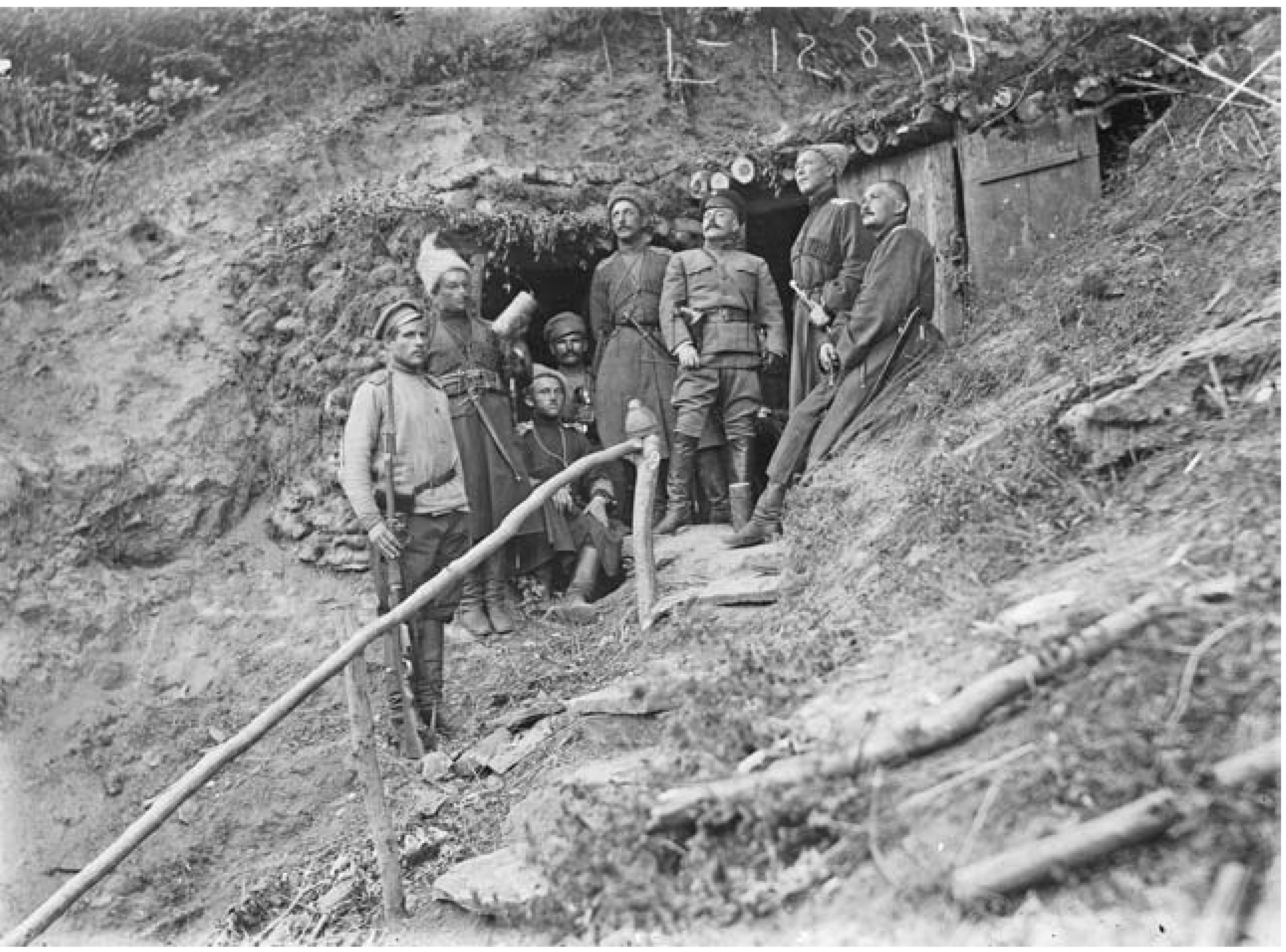 Cossacks on the Caucasian front